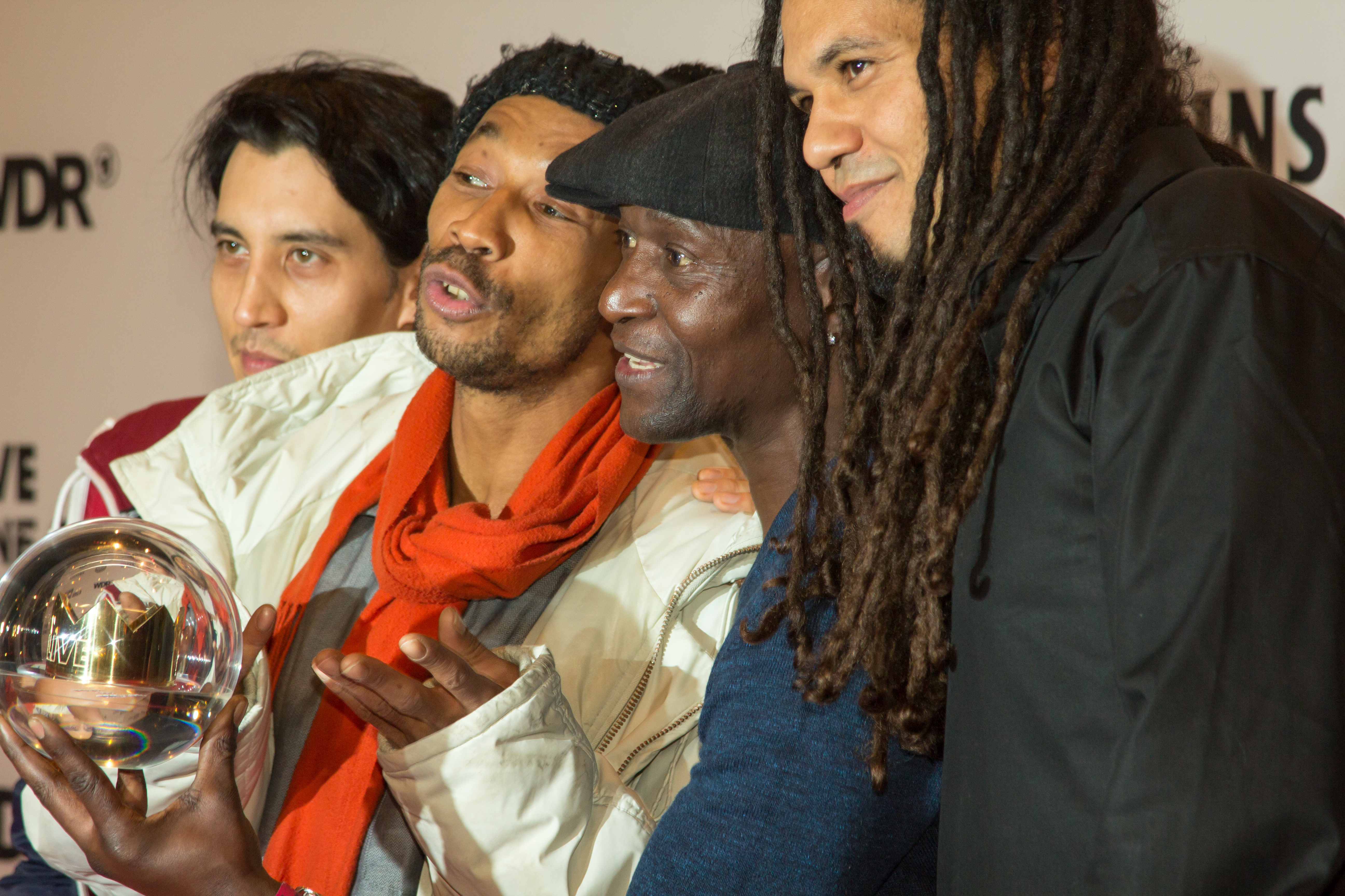 1 LIVE Krone 2013 Preisträger Seeed